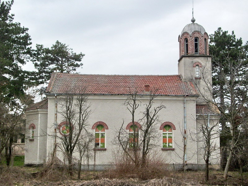 Село Берковски, община Попово. Църковният храм.